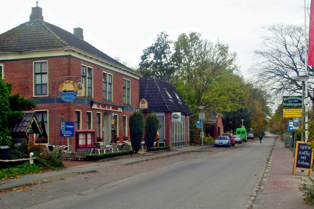 Hoofdstraat (ĉefstrato) Pieterburen, maldekstre la kafejo "het Wapen van Hunsingo" (La blazono de Hunsingo).